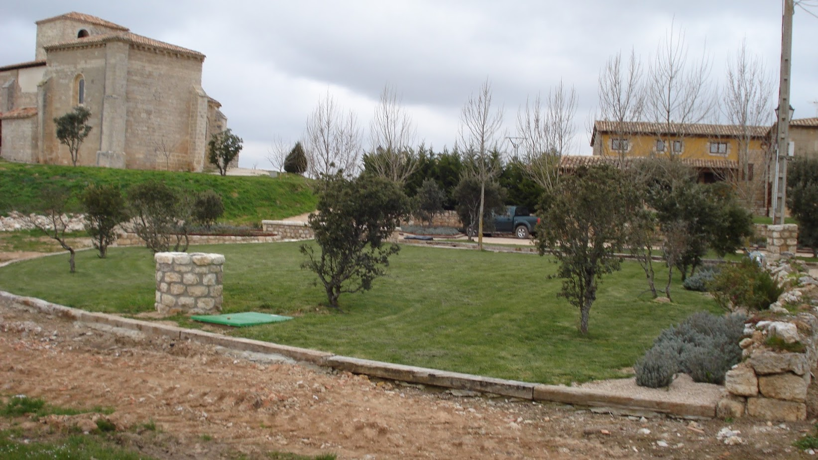 jardín construido hace dos años